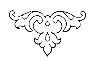 Illustration à la suite de la page 45 du livre La Reliure française depuis l’invention de l’imprimerie jusqu’à la fin du XVIIIe siècle de MM. Marius Michel (père et fils). Fer du seizième siècle.